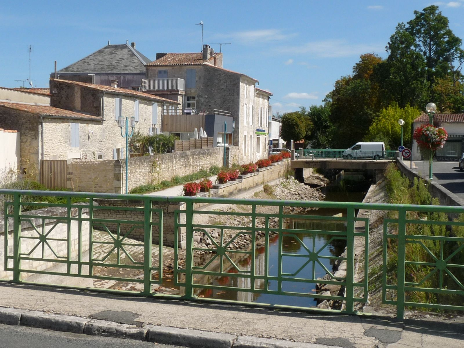 la Seudre à Saujon, Charente-Maritime, France